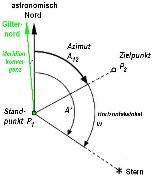 Astronomische Azimutbestimmung vom Standpunkt P1 zum Zielpunkt P2. Sie läuft auf eine Winkelmessung zwischen Gestirn und P2 hinaus. Gitternord ist die Parallele zum Gauß-Krüger-Koordinatensystem.